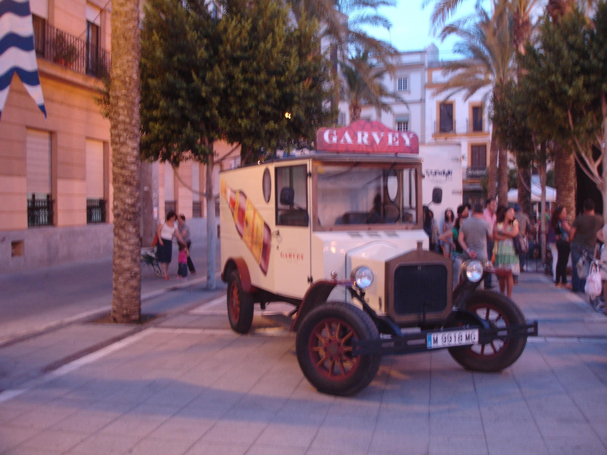 Grupo Garvey old adv car, Jerez de la Frontera. (Andalusia, Spain)